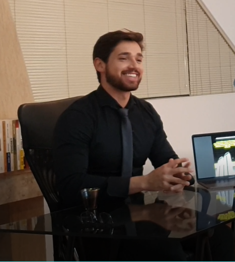 Thadeu Ribas Lugarini (Curitiba, 27 de dezembro de 1996) é engenheiro civil pela Universidade Positivo e pesquisador na área de Engenharia estrutural. Dentre suas publicações, publicou "Estruturas de Concreto Armado: Avaliação dos Parâmetros de Instabilidade Global em Edifícios de Múltiplos Pavimentos em Concreto Armado com Inclusão de Núcleos Rígidos" (Mepe, 2020)